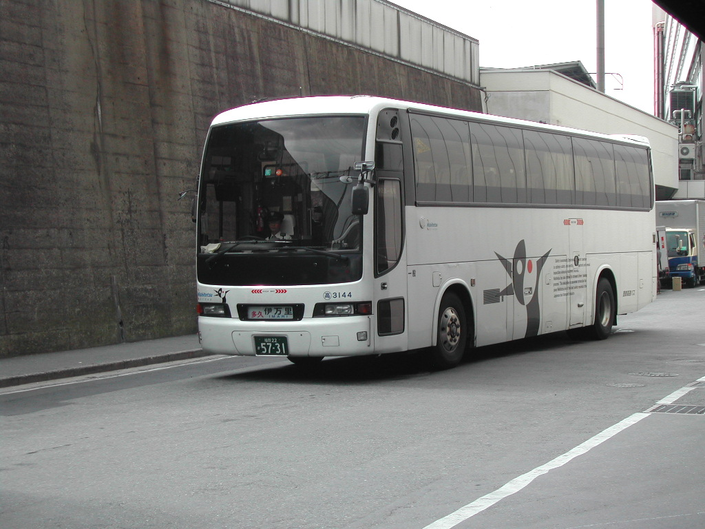 西鉄バス担当時代 博多駅交通センター